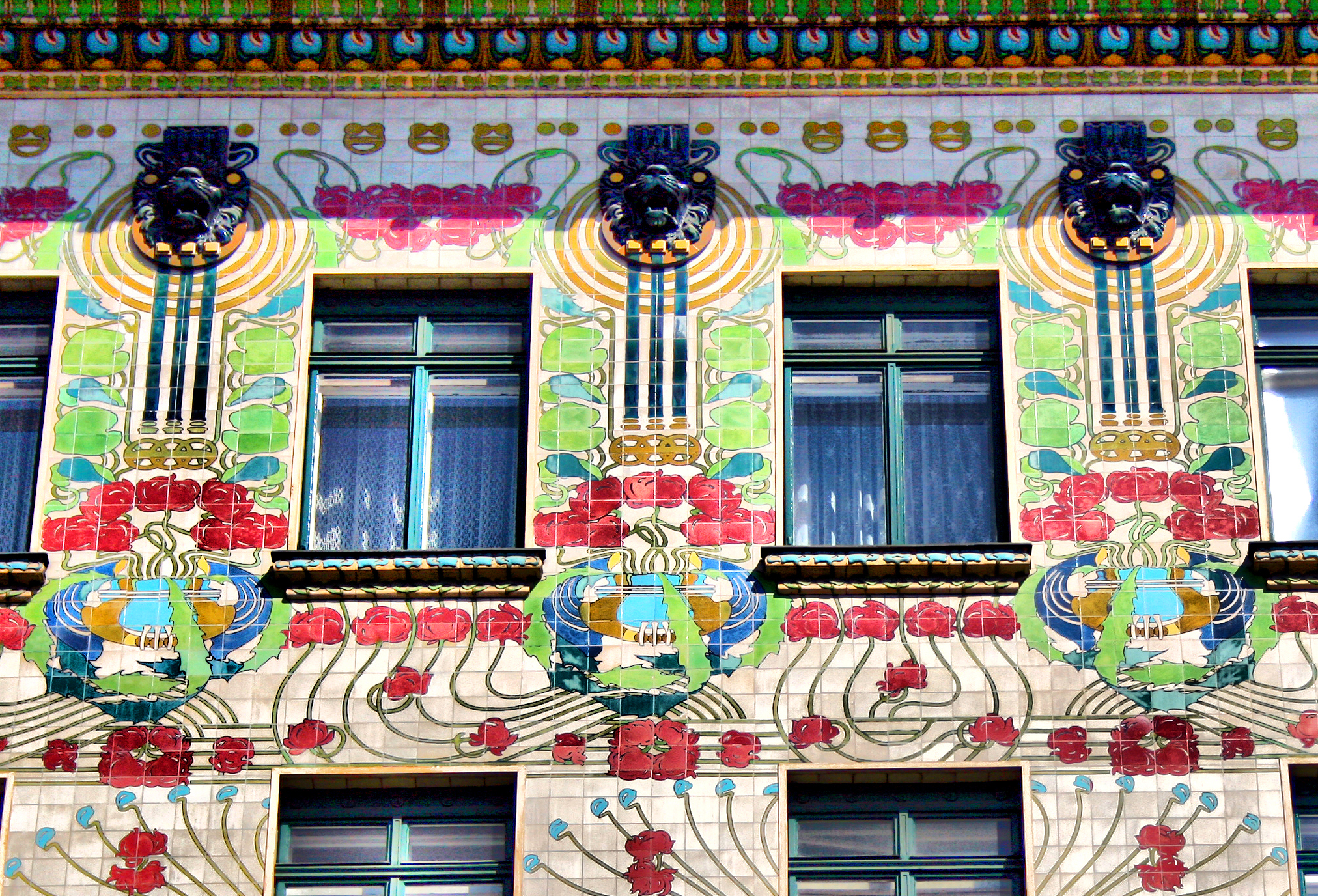 Wohn- und Geschäftshaus, Majolika-Haus